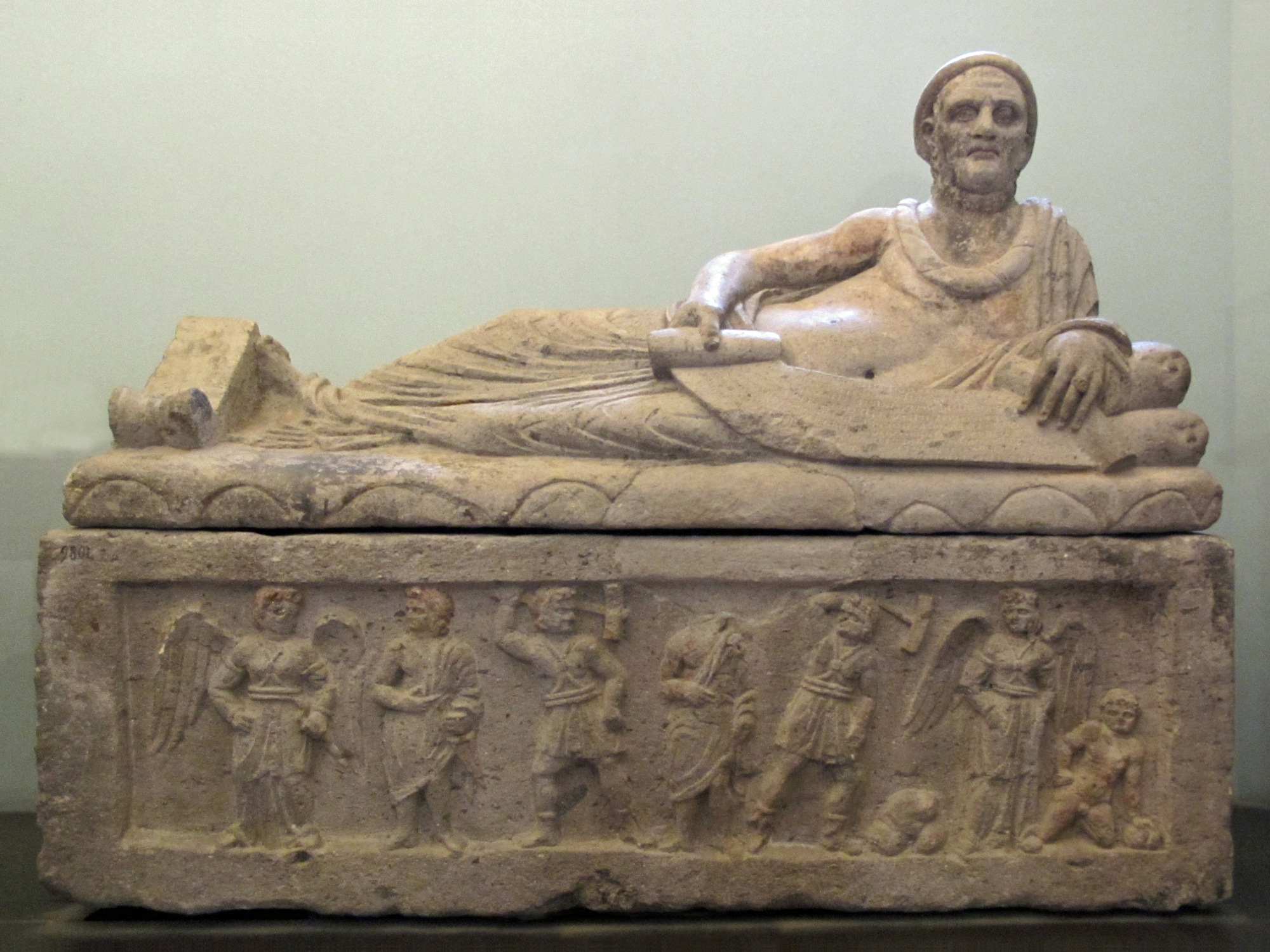 Sarcophage de Laris Pulena